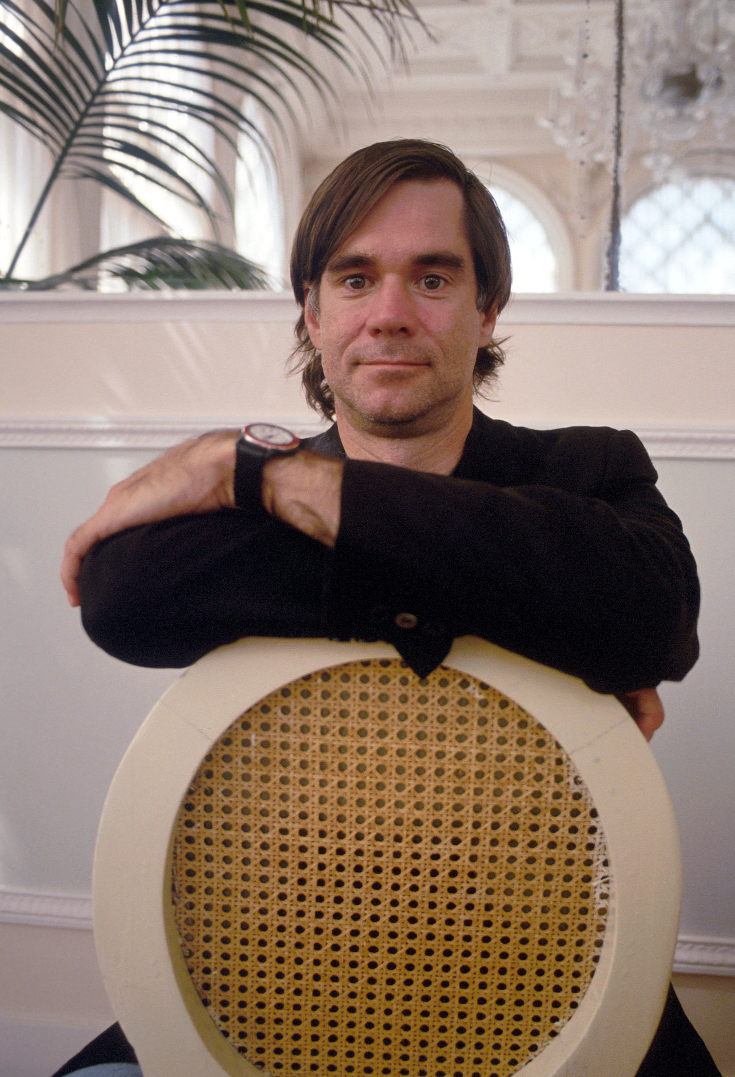 Il regista statunitense Gus Van Sant alla Mostra del cinema di Venezia del 1993